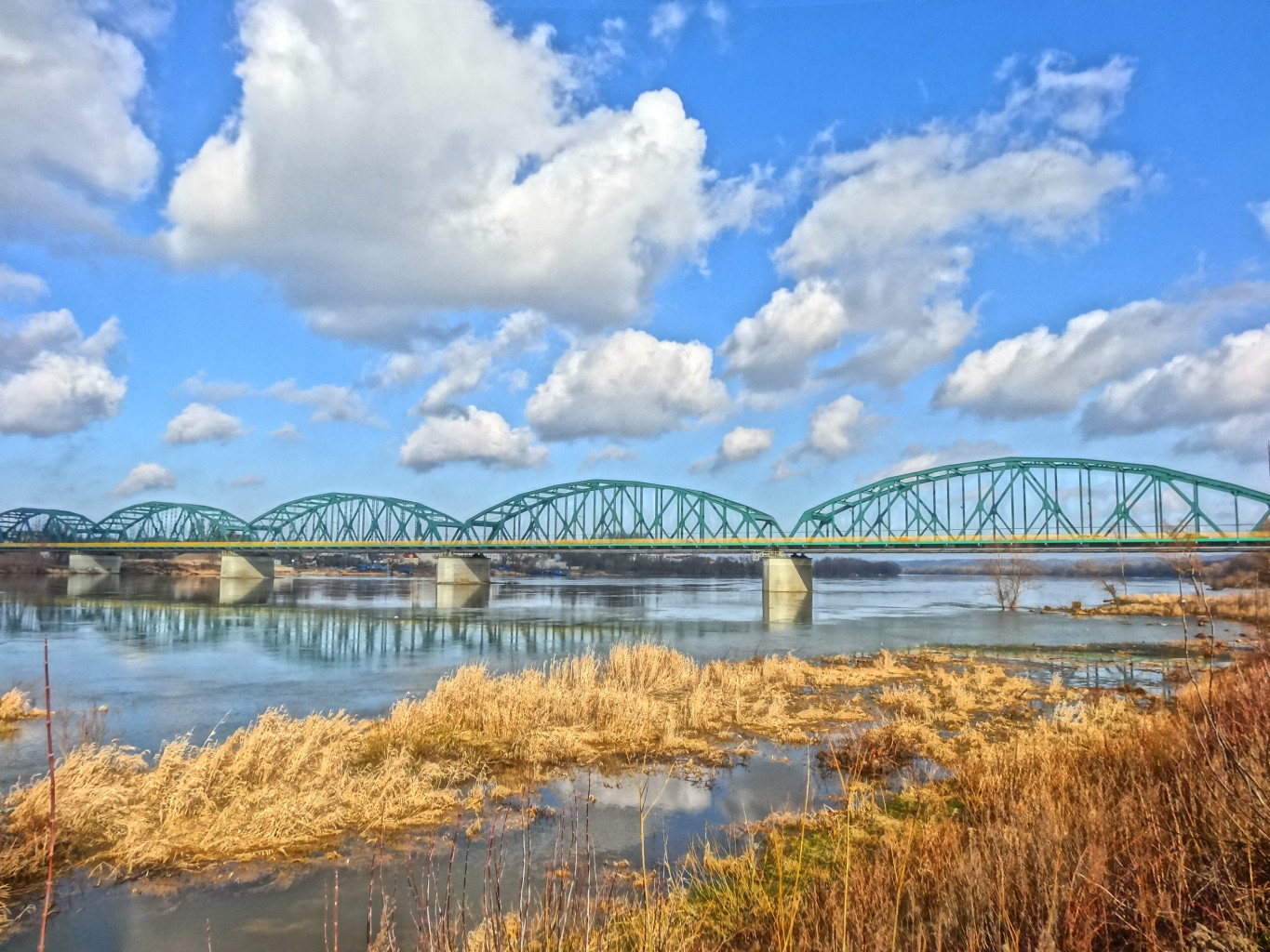 Wisła w Bydgoszczy - most fordoński im. Rudolfa Modrzejewskiego